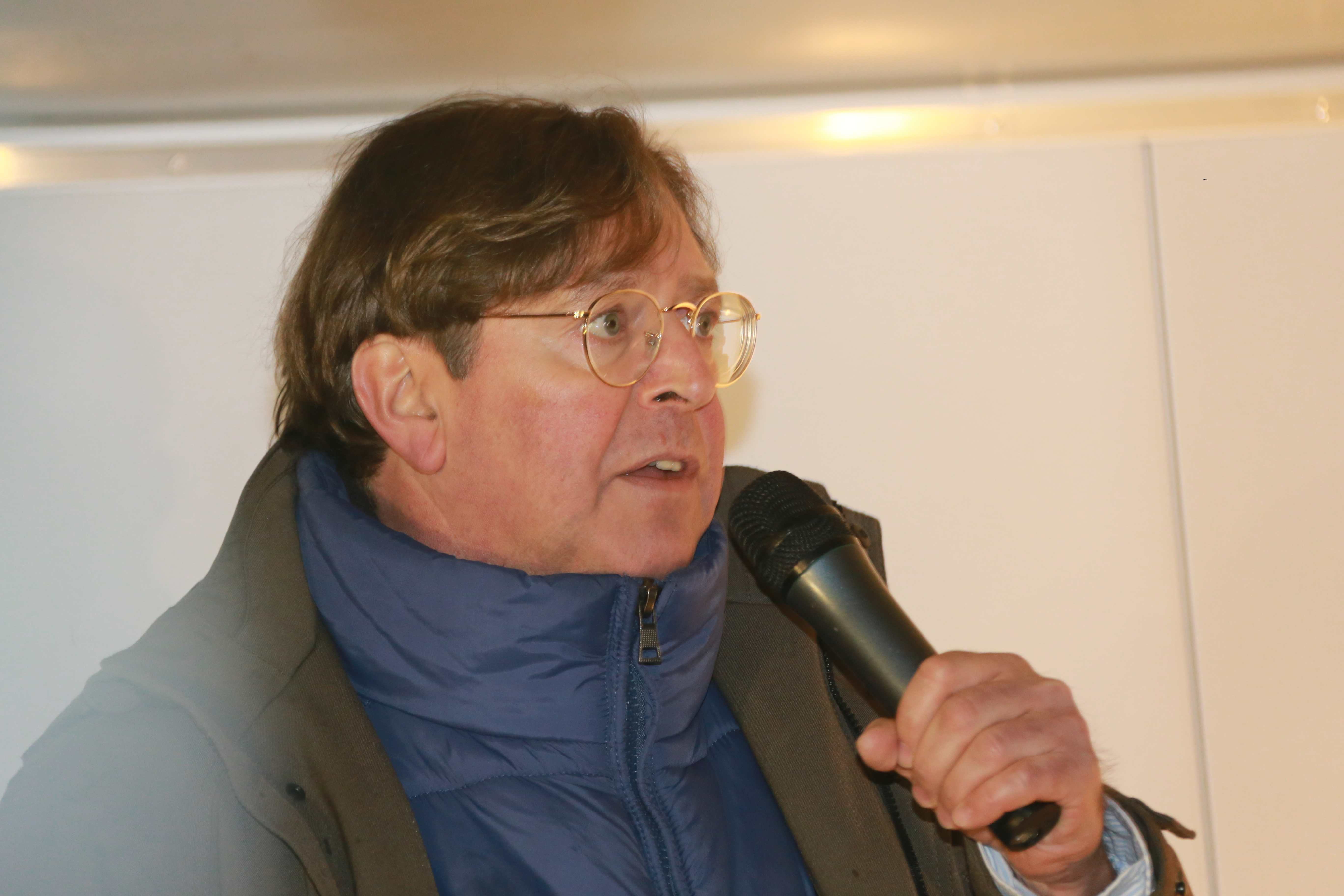 Pegida